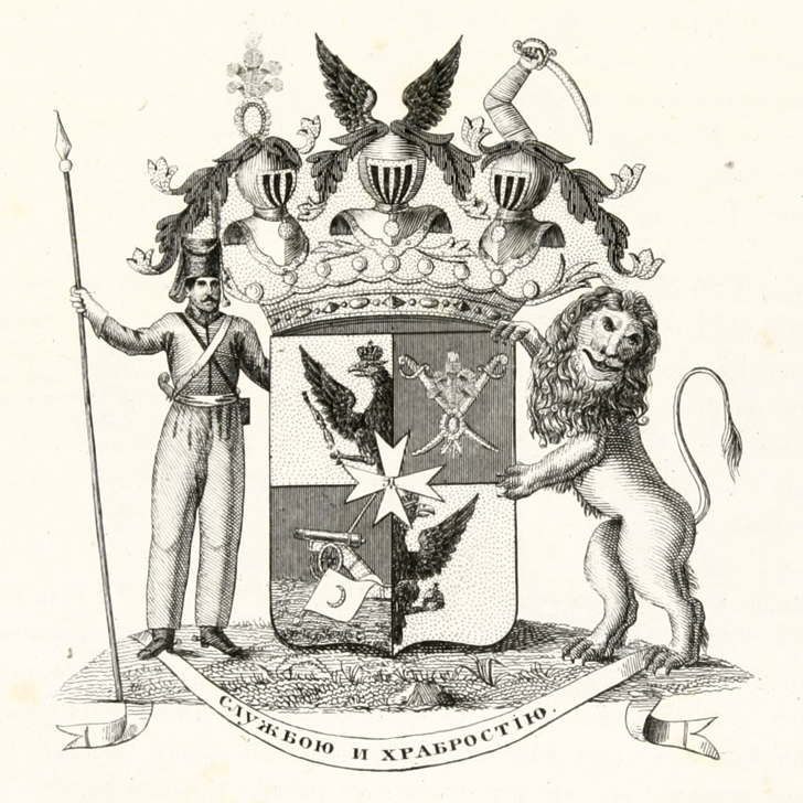 Герб рода графов Орловых-Денисовых